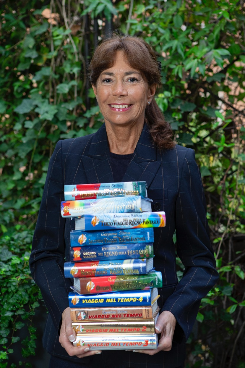 Ritratto dell'autrice Elisabetta Dami nel 2019